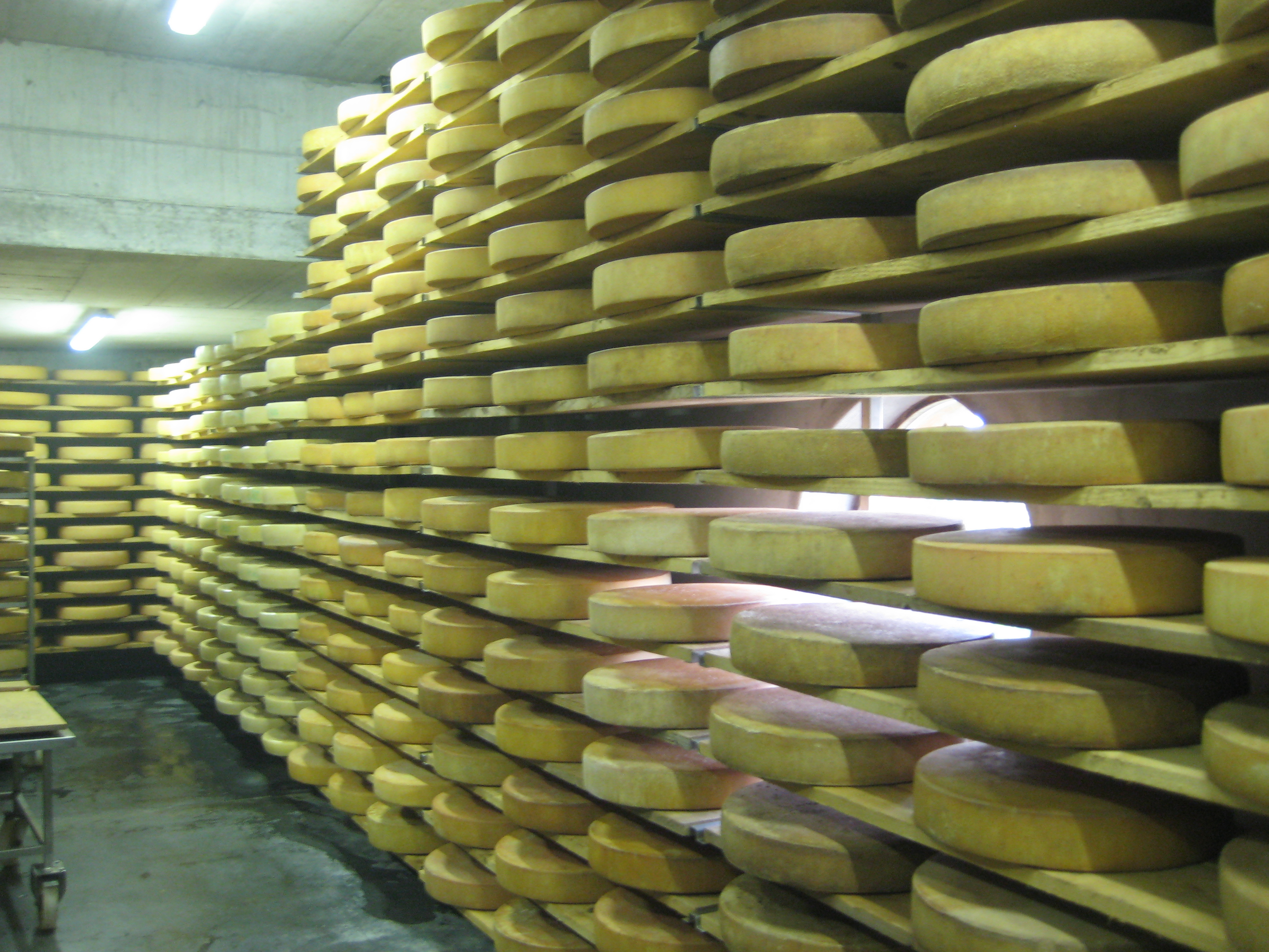 Käselagerung in einer kleinen Sennerei in Warth, Vorarlberg